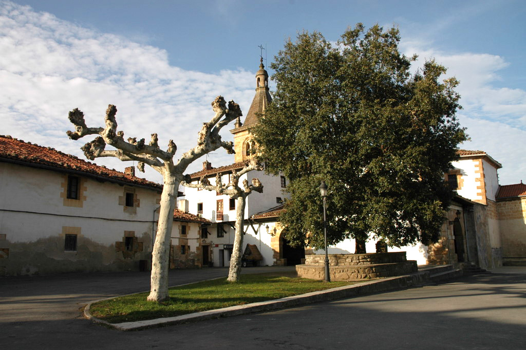 Zerain udalerriko eliza eta herriko enparantza. Gipuzkoa, Euskal Herria. Church and main square of Zerain village. Guipuscoa, Basque Country.